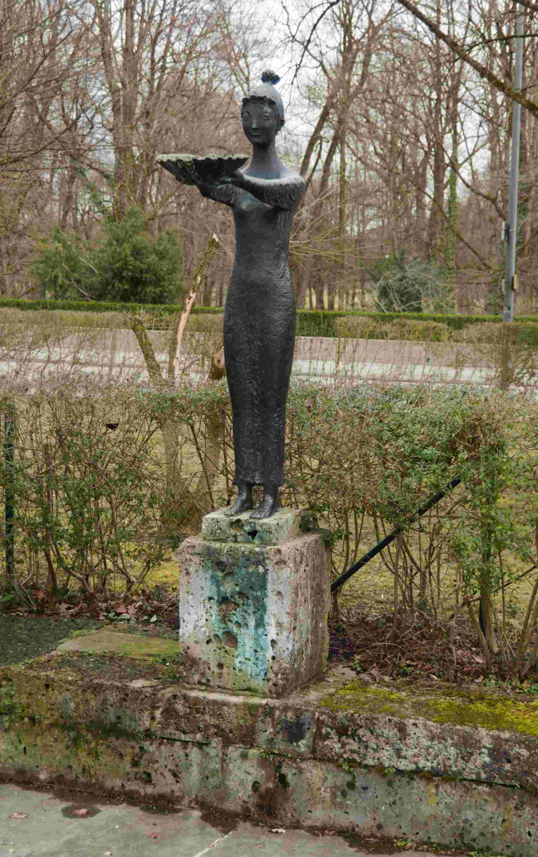 Von Augustin Lohr gestalteter Quellenbrunnen in München: Die bronzene Brunnenfigur in der Nähe des Englischen Gartens lässt Wasser aus einer Schale in ein in den Boden eingelassenes Becken fließen.